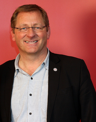 Jorodd Asphjell